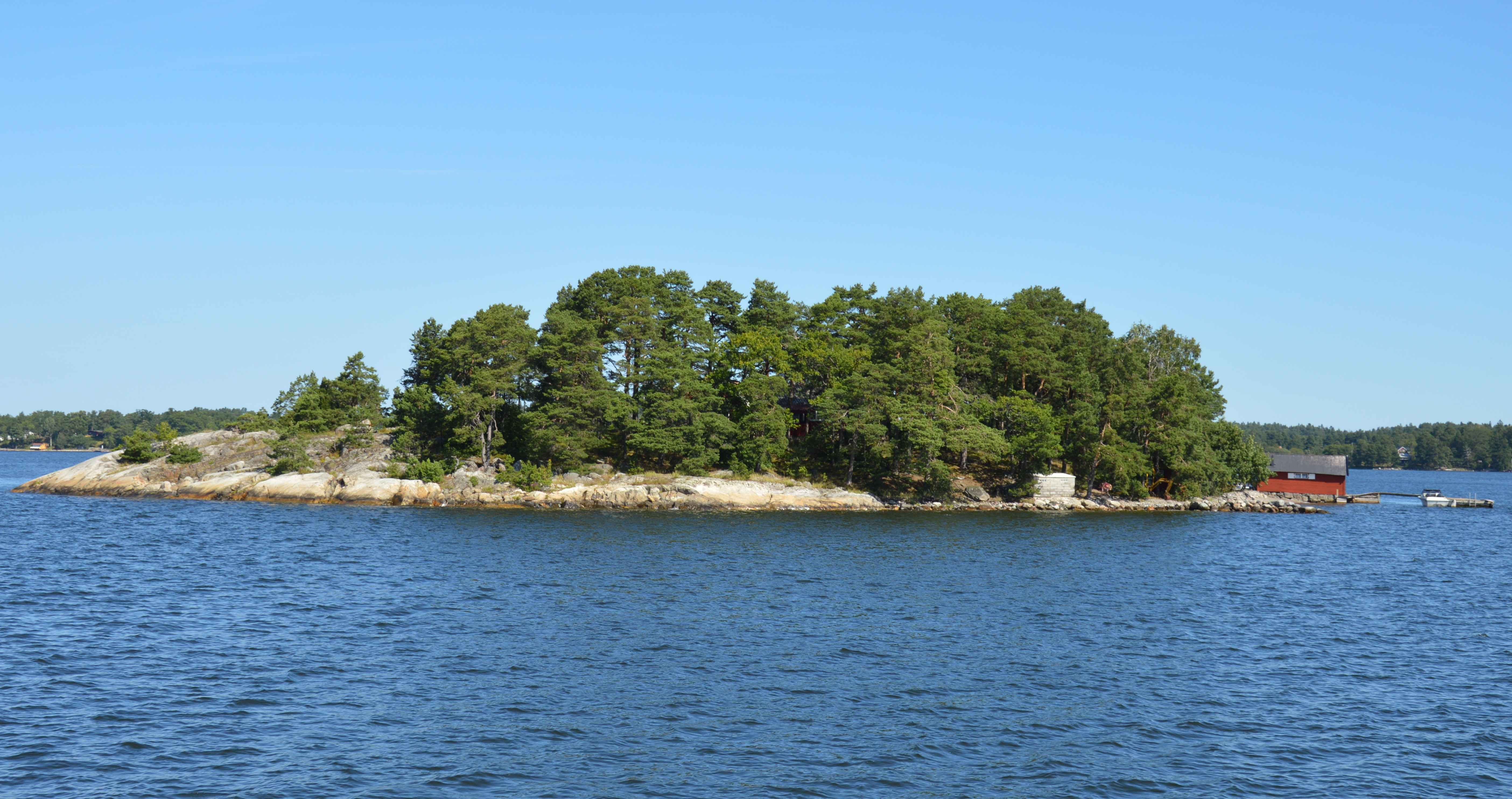 Insel Storholmen